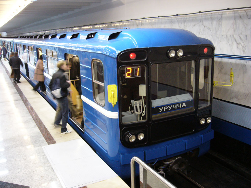 Metro station Uruch'e (Уручье, Уручча) in Minsk, Belarus